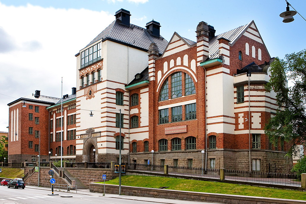 Kungsholmens gymnasium på Hantverkargatan 67, Stockholm